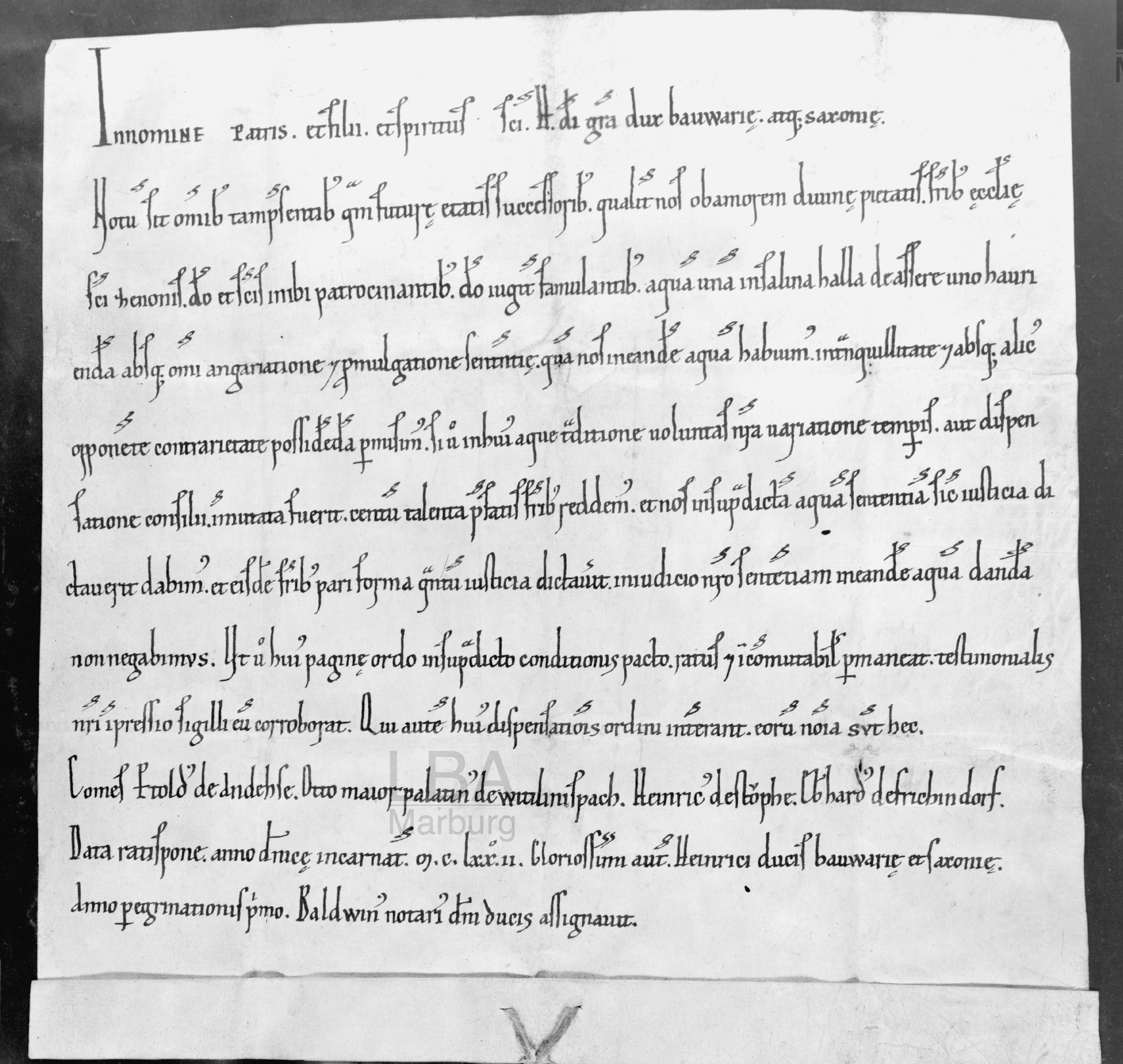 Urkunde Heinrichs des Löwen als Herzog von Bayern für Kloster Reichenhall von 1172. Druck: Diplomata H d. L. Nr.93 Mon. Boica 3 S. 547 Aus den Beständen des Lichtbildarchivs älterer Originalurkunden an der Philipps-Universität Marburg mit sehr guter Wiedergabe des Siegels Heinrichs des Löwen.